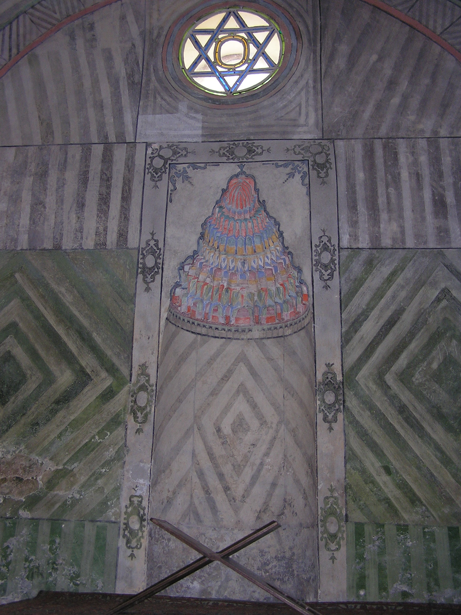 Михраб